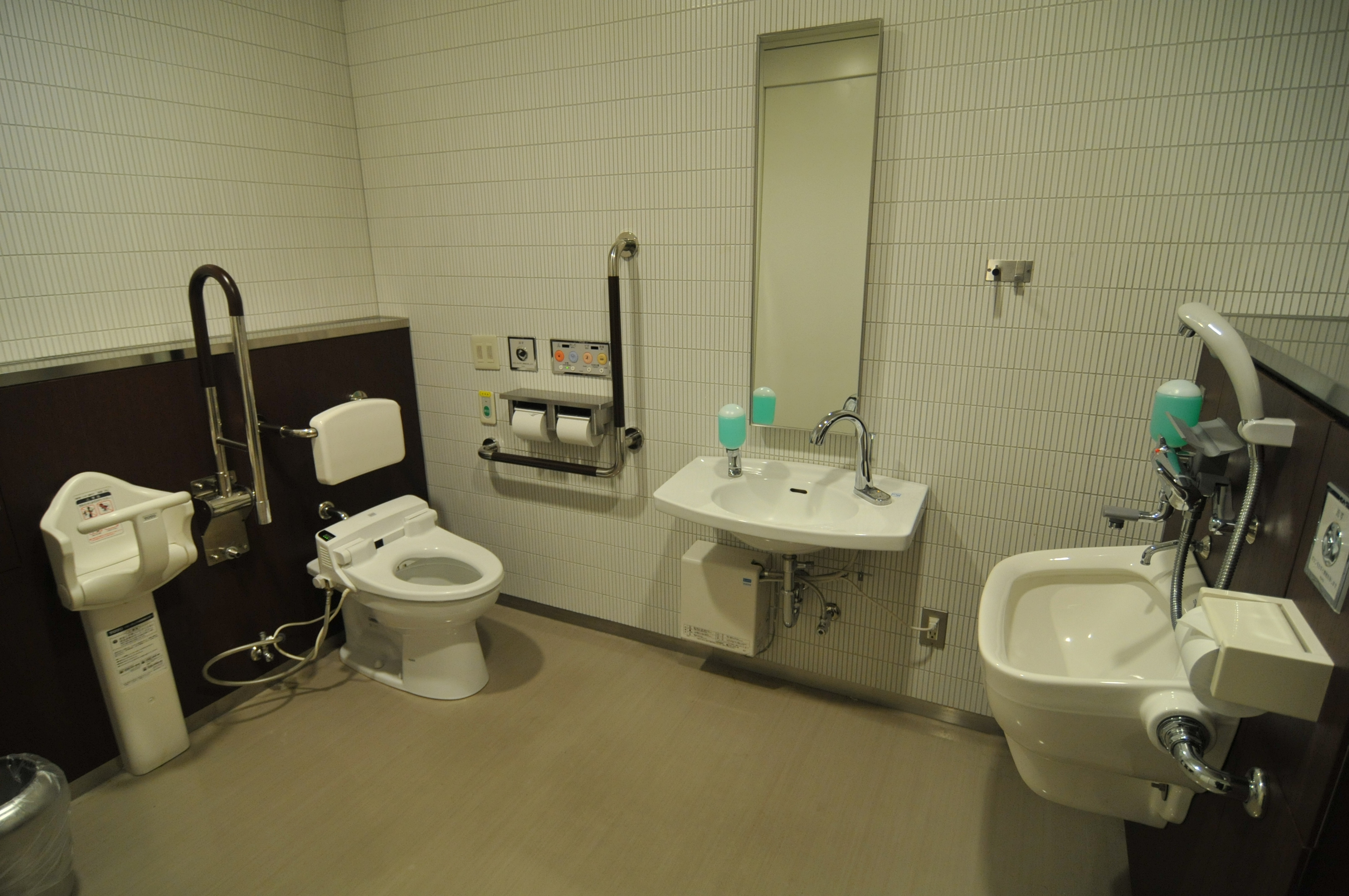 成城コルティ多目的トイレ